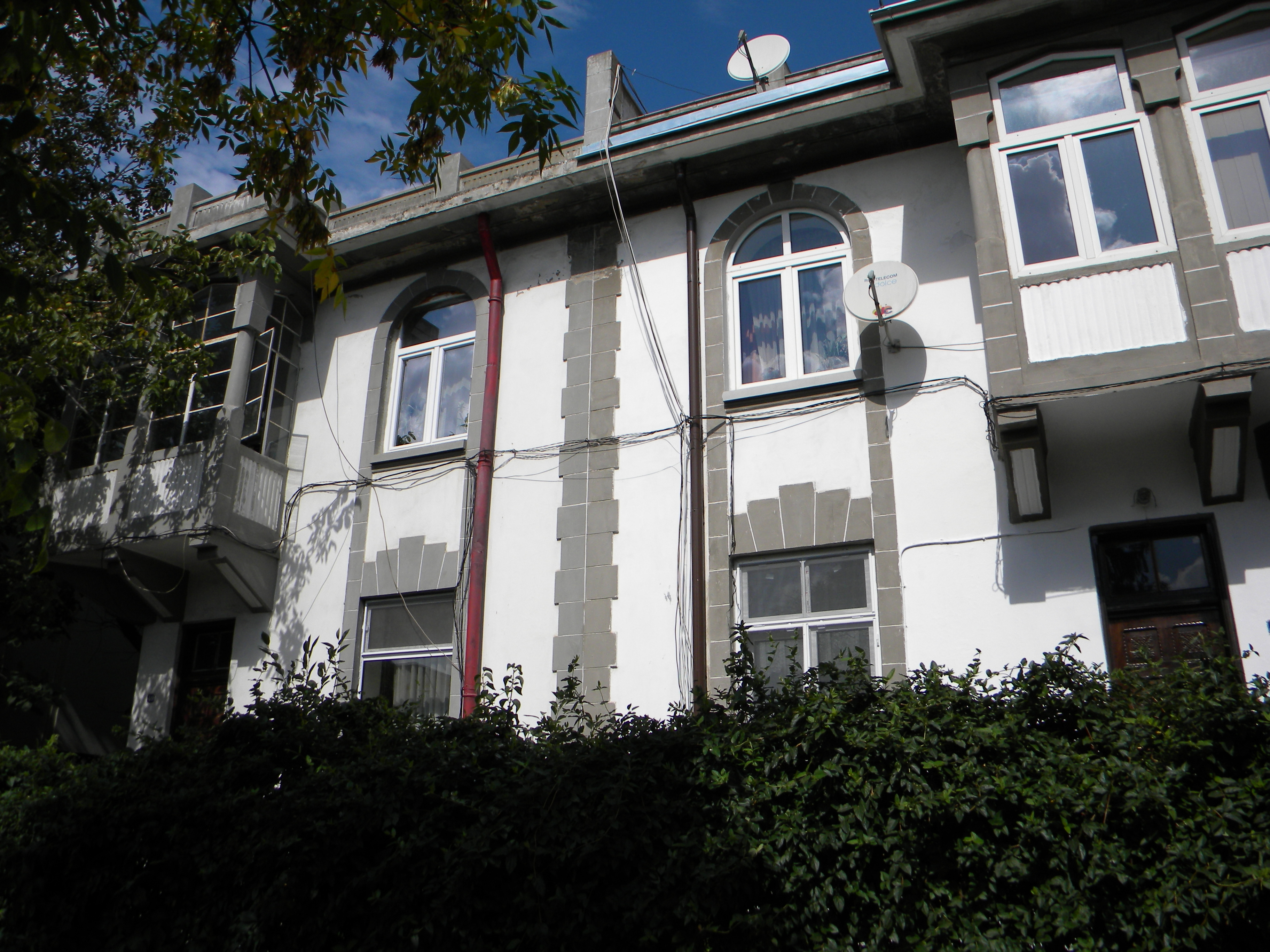 Bucuresti, Romania, Str. Alexandru Constantinescu nr. 51, sect. 1; B-II-m-B-18478 (2)